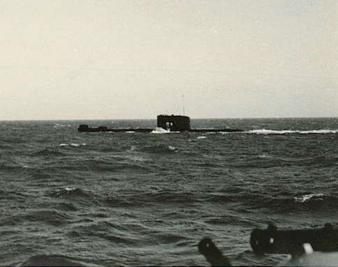 אח"י דקר במפגש בתעלה האנגלית, צילום מגשר אח"י מבטח, נובמבר 1967